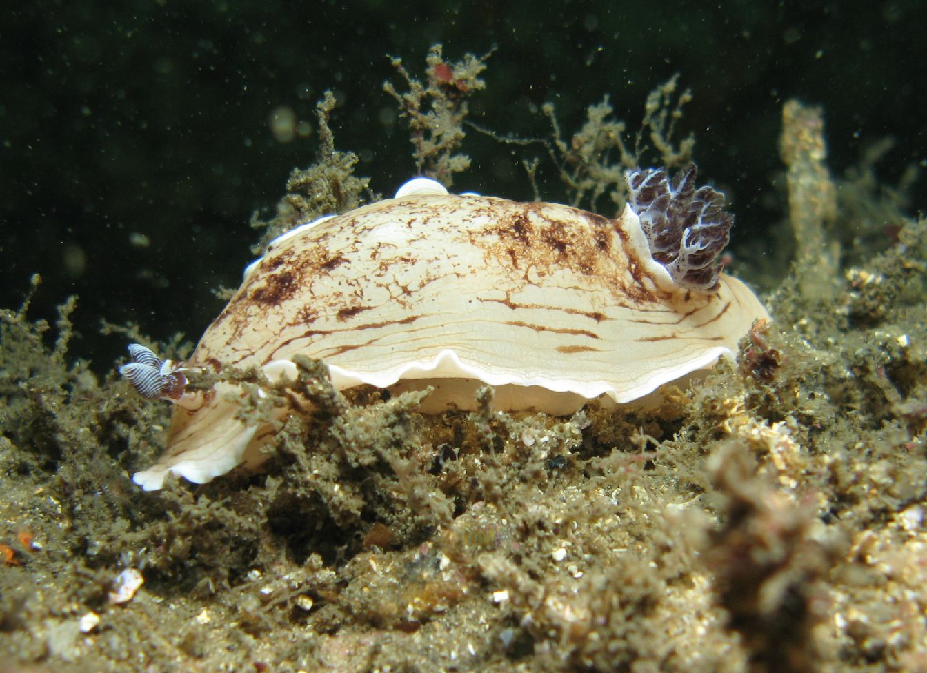 Aphelodoris variaIMG_1979